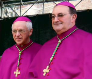 Mgr Jozef De Kesel en Guy Harpigny tijdens de en Heilig Bloedprocessie in Brugge